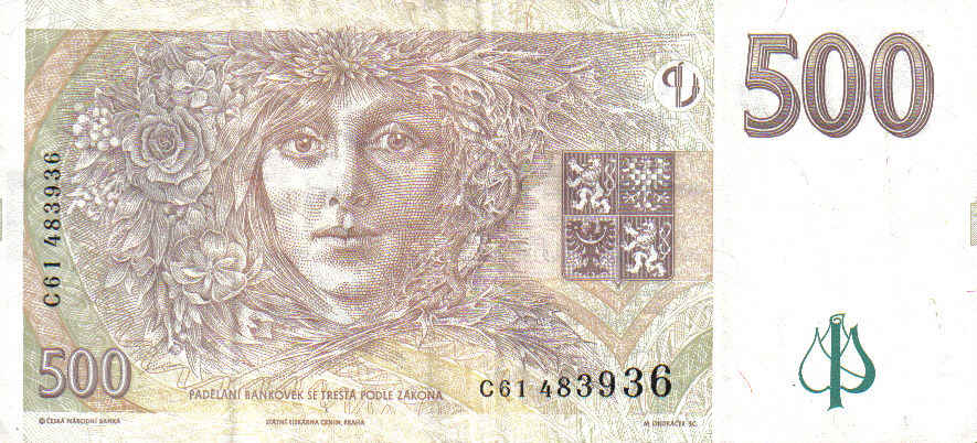 500 Tschechische Kronen Rückseite